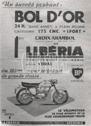 affiche de victoire au Bol d'Or 1956